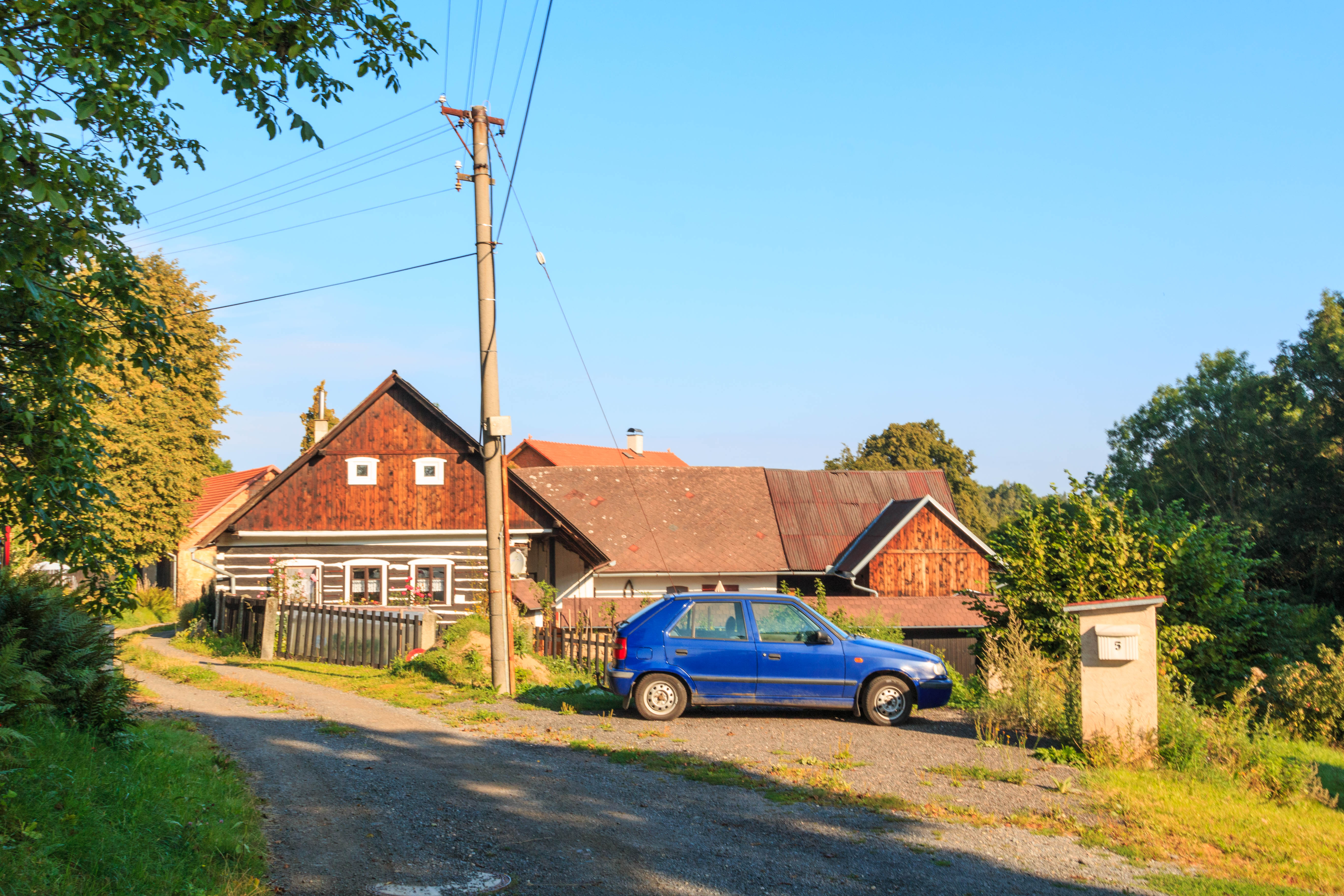 Střítěž u Příkrakova - čp. 1